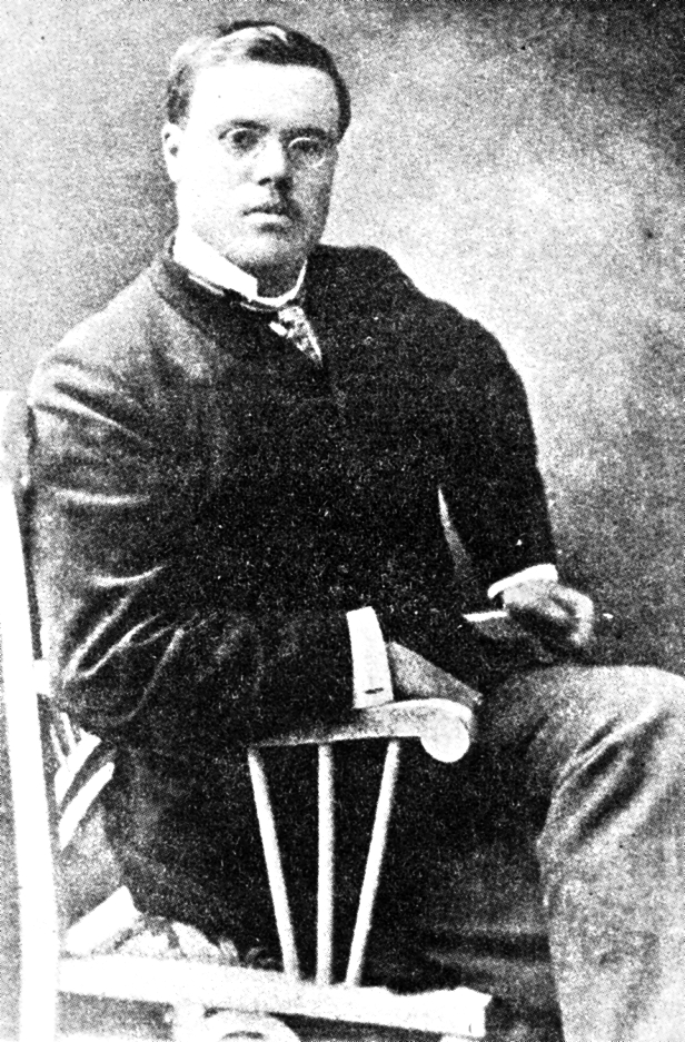 Francisco García Calderón Rey (1883-1953) filósofo, escritor y diplomático peruano, hijo del gobernante de La Magdalena.